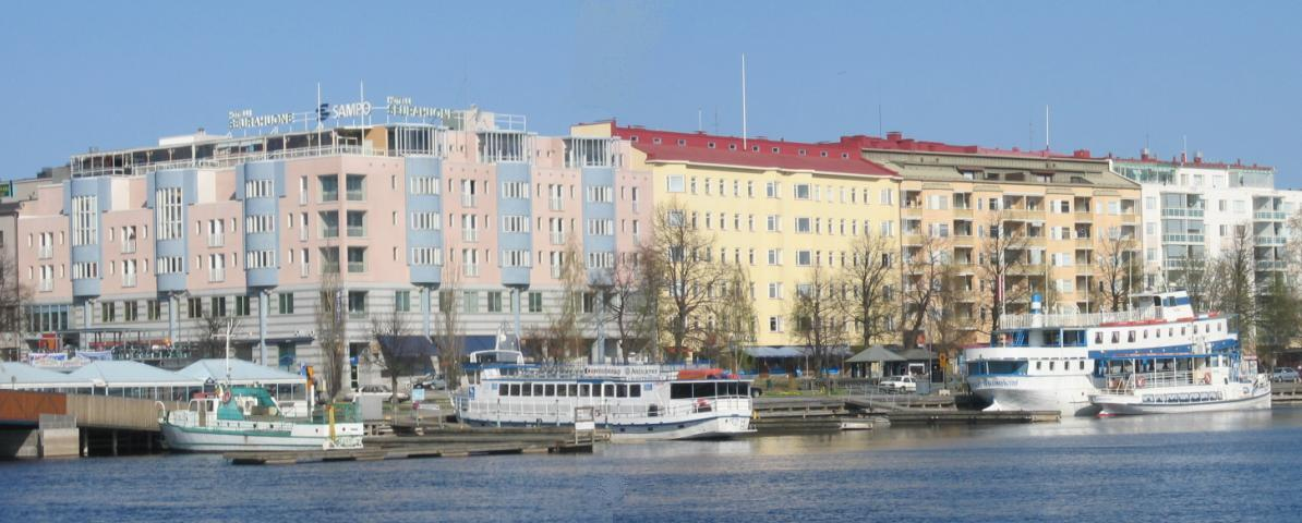 Savonlinna, Finland